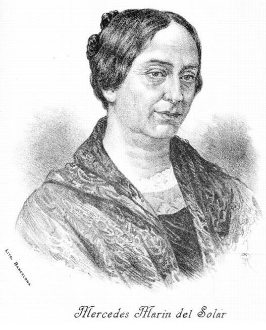 Mercedes Marín del Solar (1804-1866), primera poetisa e intelectual chilena, hija del integrante de la Primera Junta Nacional de Gobierno de Chile Gaspar Marín, de gran popularidad en su tiempo dedicó sus últimas años a la beneficiencia, la acción política y la educación de la mujer.